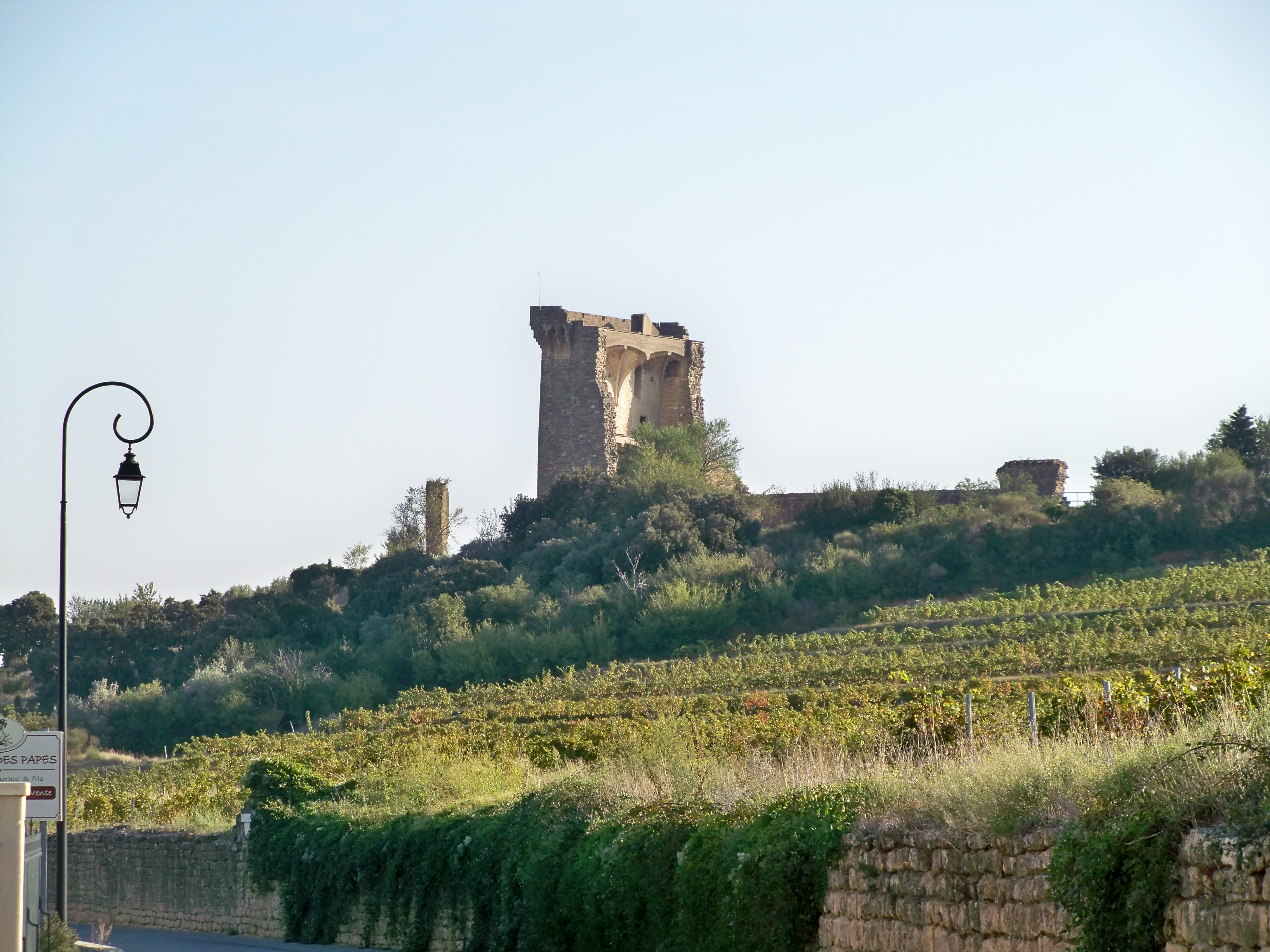 Château et vigne du clos des papes à Châteauneuf des Papes (84) .